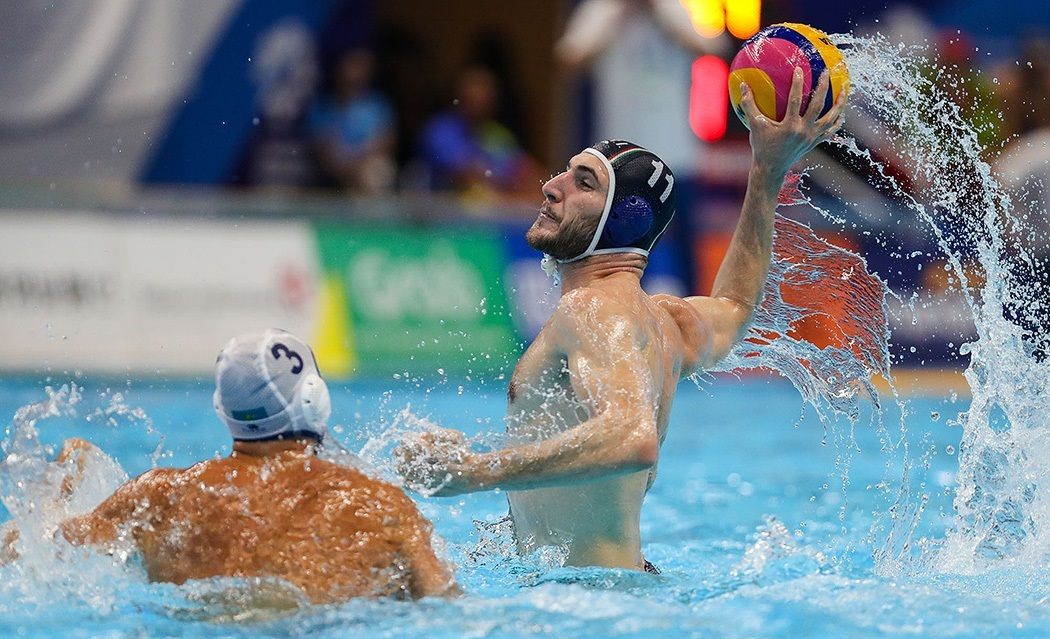 دیدار تیم ملی واترپلو ایران و قزاقستان در بازی‌های آسیایی ۲۰۱۸